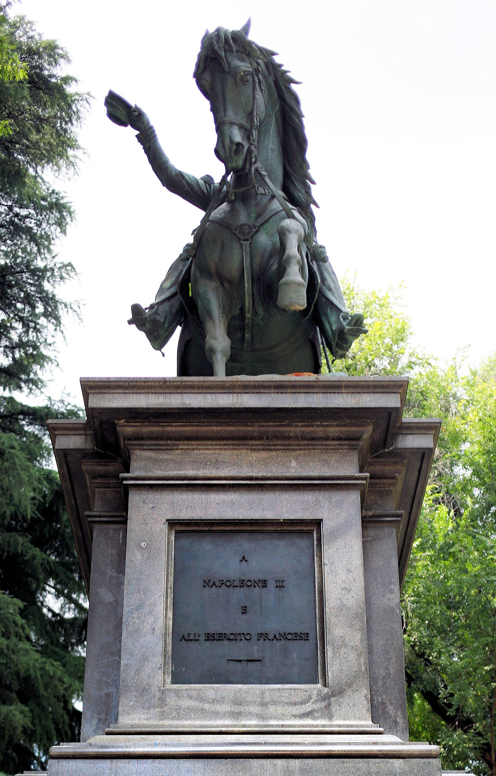 Monumento a Napoleone III, vista frontale con dedica